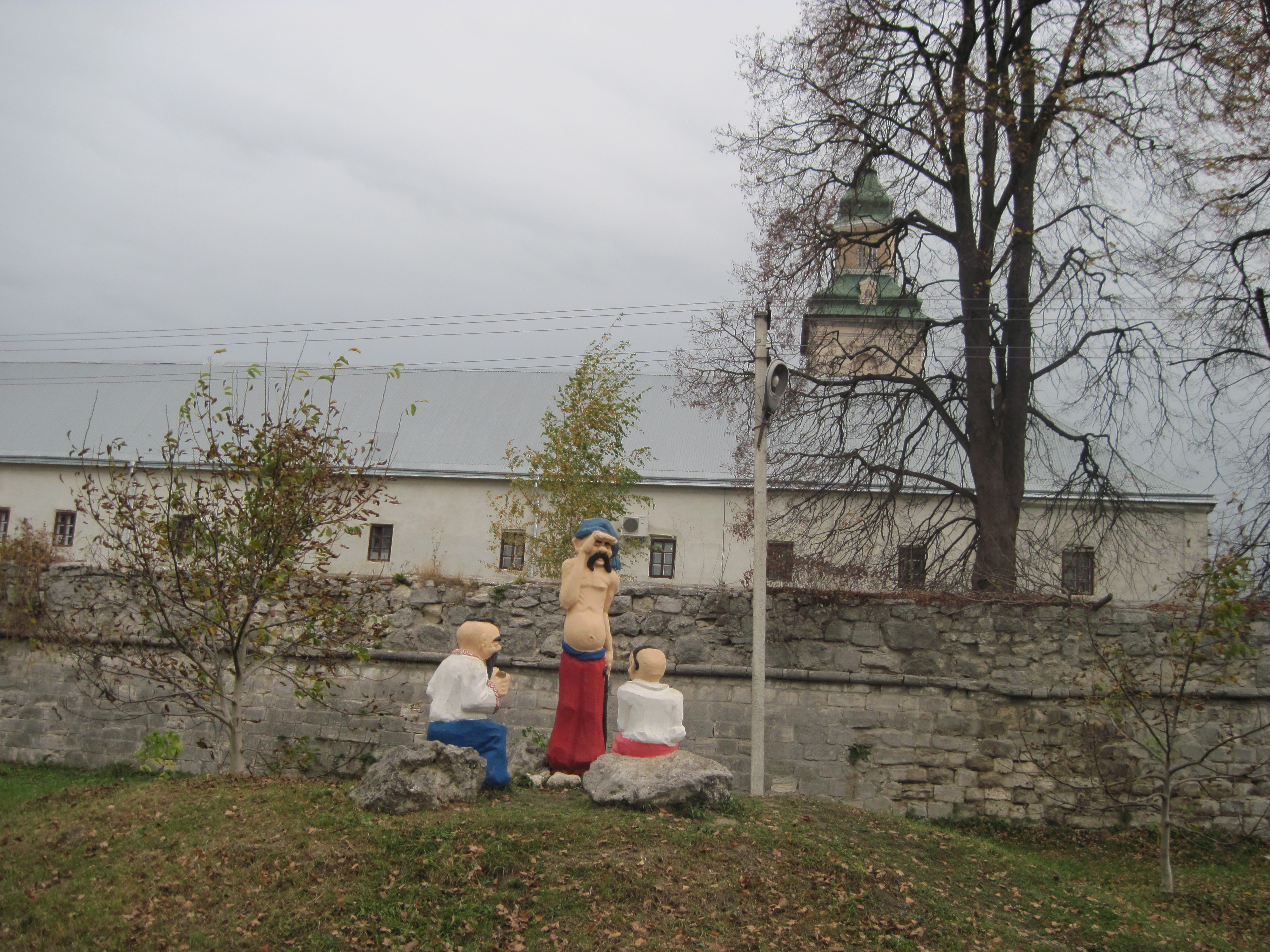 Козаки біля колишнього монастиря бернардинів, Збараж, осінь 2014